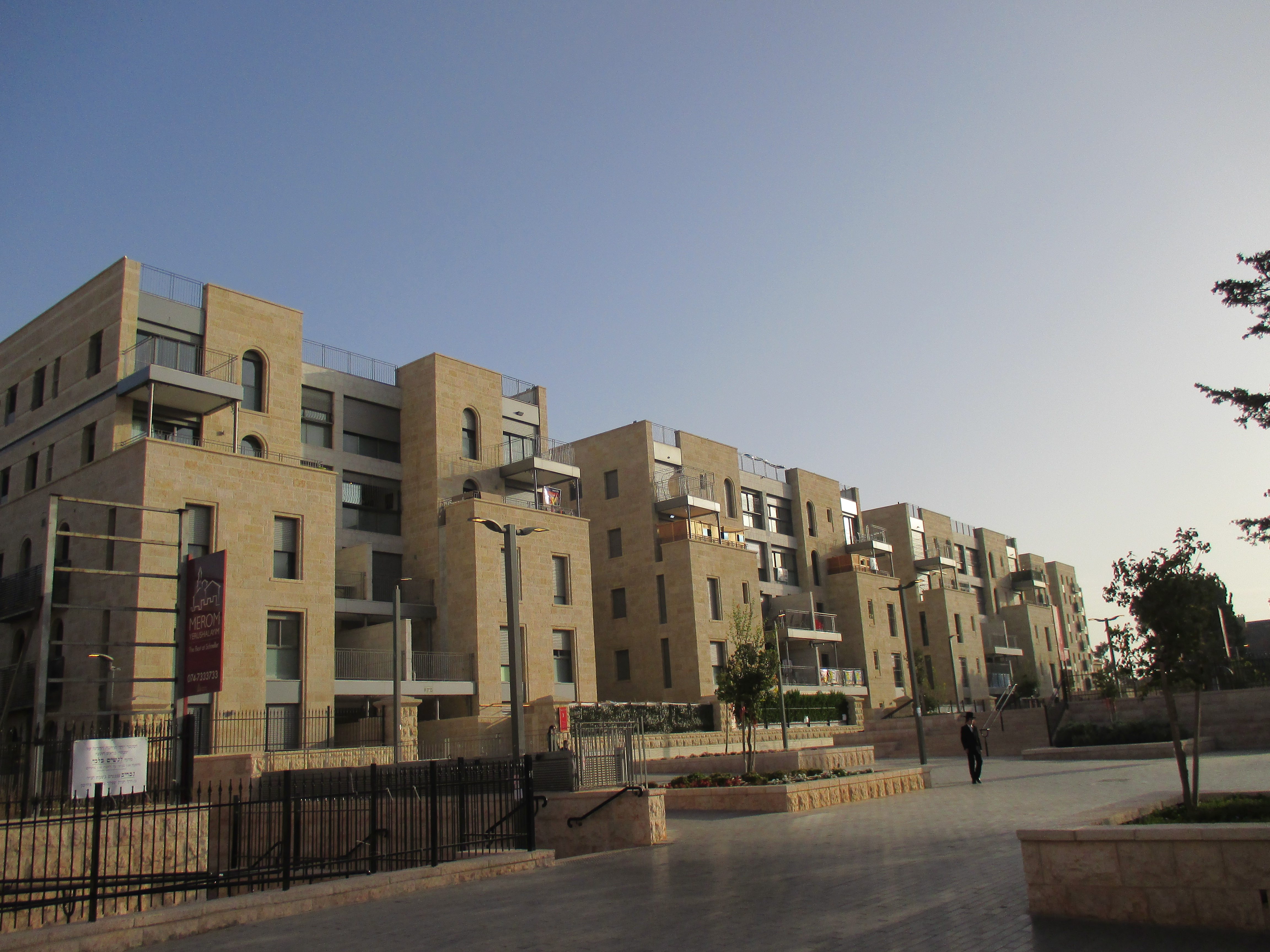 שכונת המגורים שנבנתה בסביבת בית היתומים שנלר